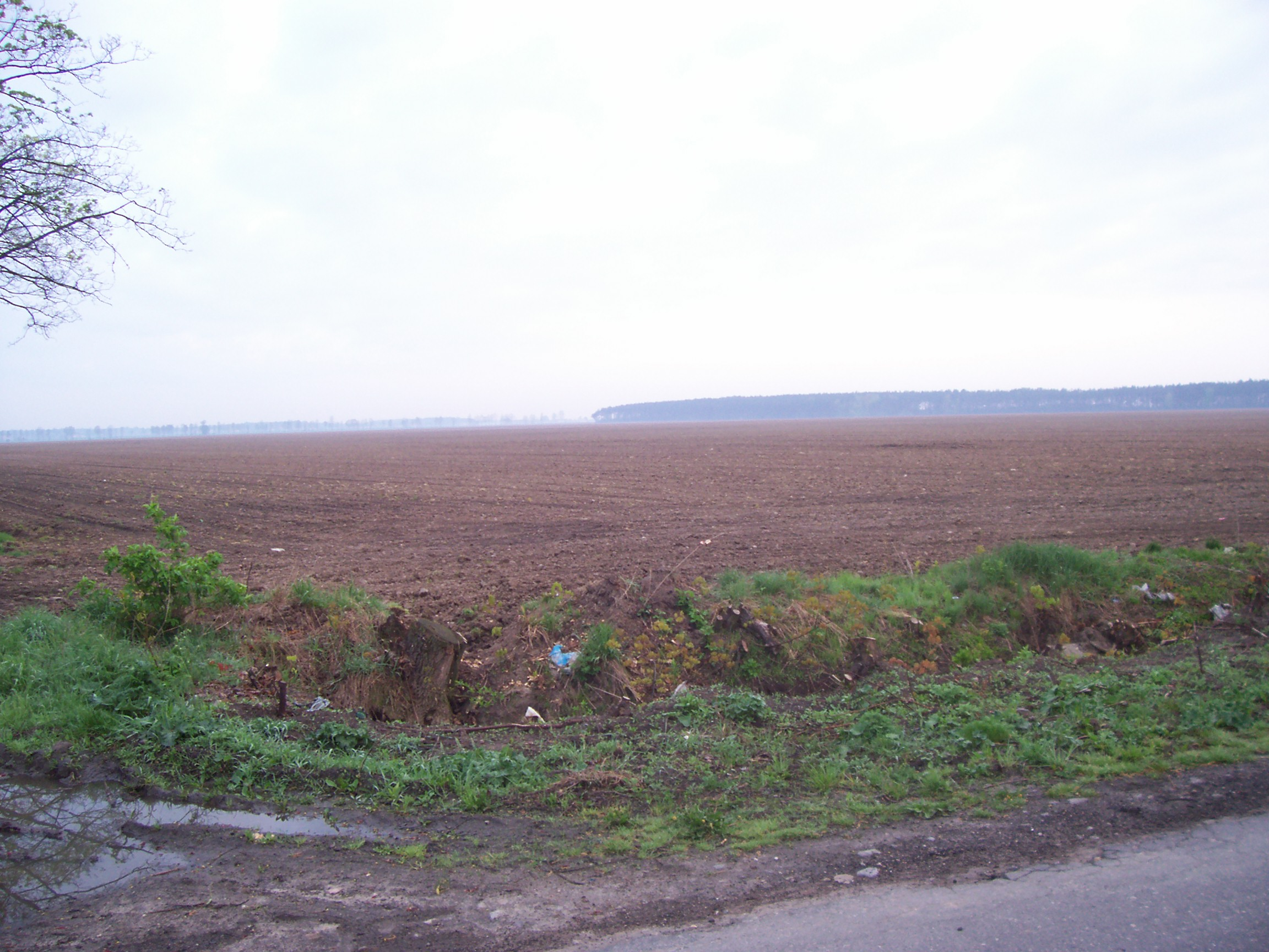 Pole pod Bogusławicami niedaleko Wolborza. W czasie Kampanii Wreśniowej było tutaj zaimprowizowane lotnisko Luftwaffe, na którym 11.09.1939 wylądował Adolf Hitler. Po rozmowie z lotnikami pojechał obejrzeć pole bitwy pod Tomaszowem Mazowieckim.